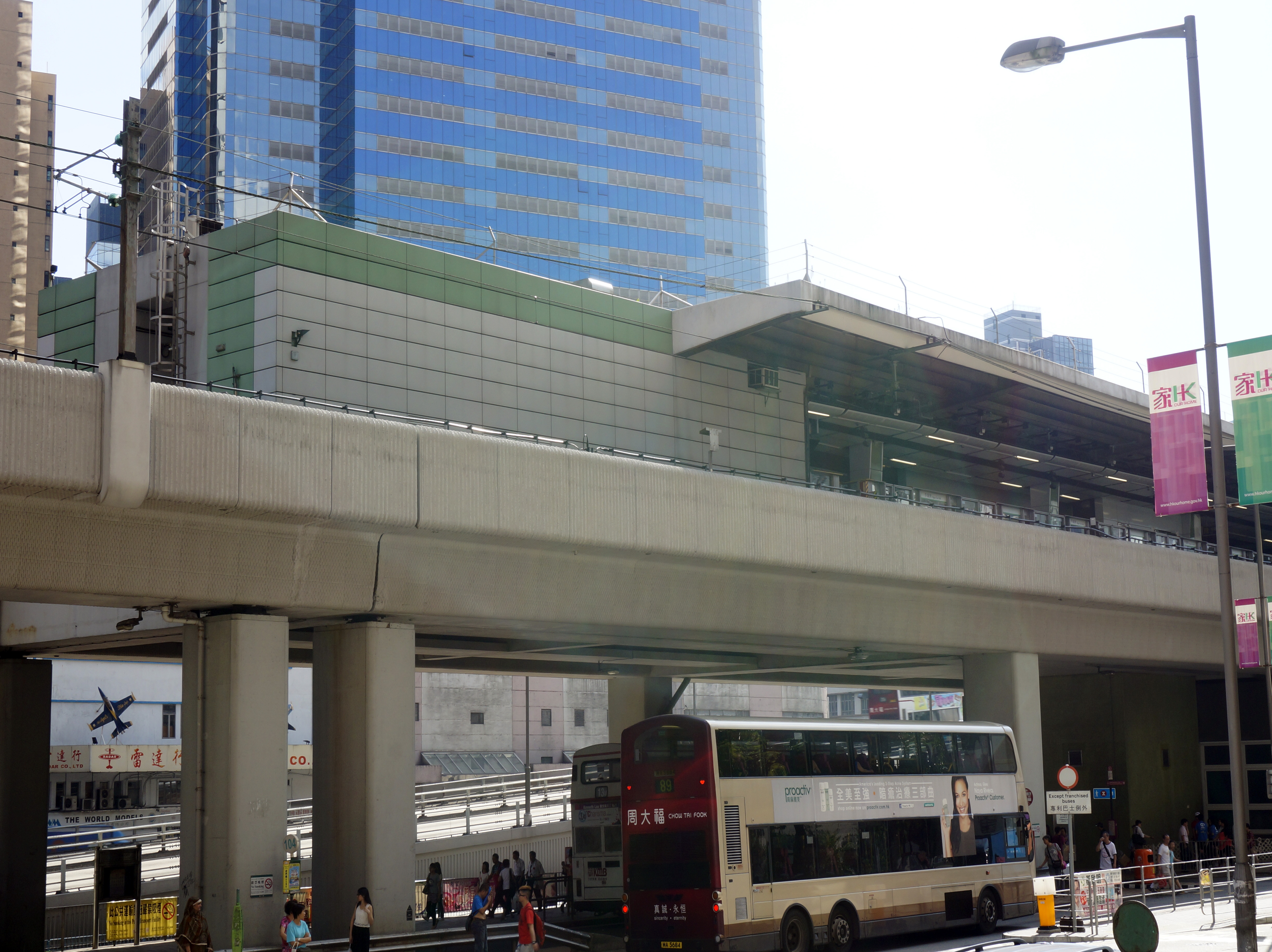 港鐵牛頭角站外觀